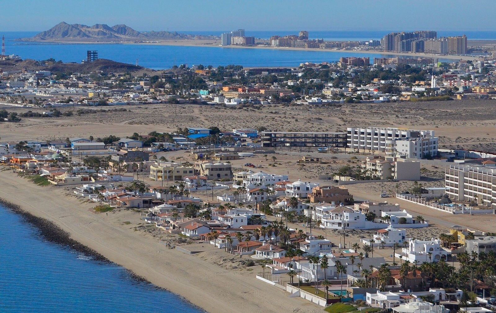 Esta es una vista de la evolución de la costa y de bienes raíces de Puerto Peñasco a lo largo de la playa.